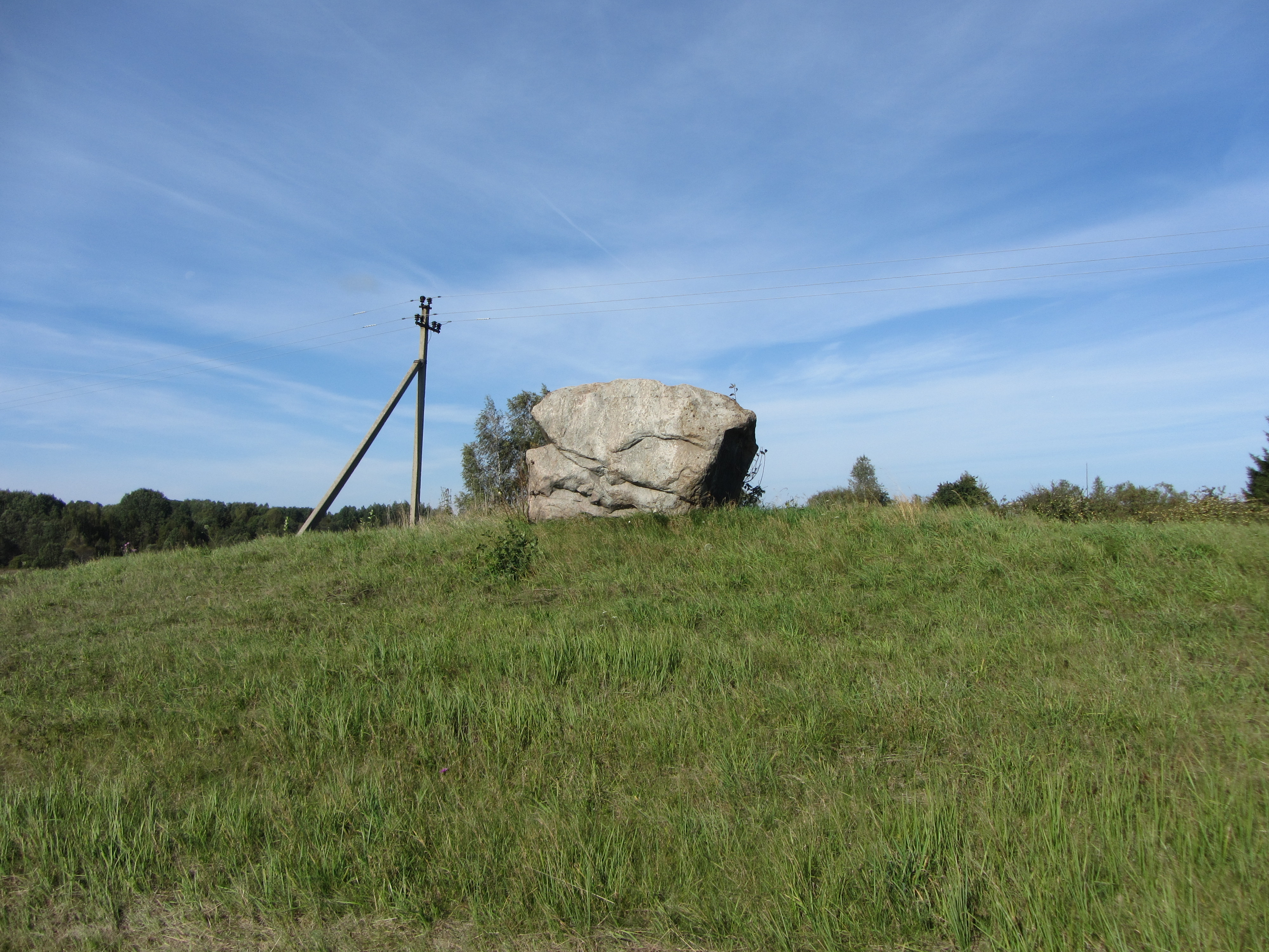 Kazitiškio sen., Lithuania